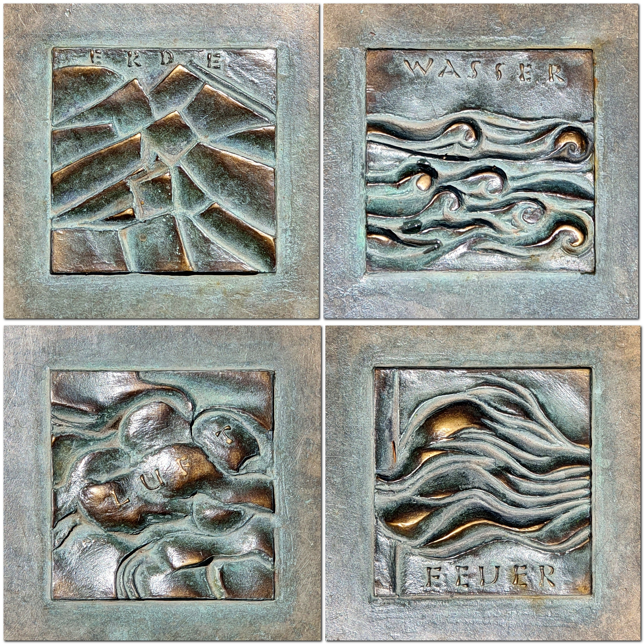 Die Darstellung der Vier Grundelemente: Erde-Wasser-Luft-Feuer auf den Abdeckungsplatten des Vier-Elemente-Brunnens von Huber Elsässer auf auf dem Vorplatz der katholischen Pfarrkirche Johann-Baptist in Gröbenzell im Landkreis Fürstenfeldbruck, Abmessungen etwa 30x40 Zentimeter